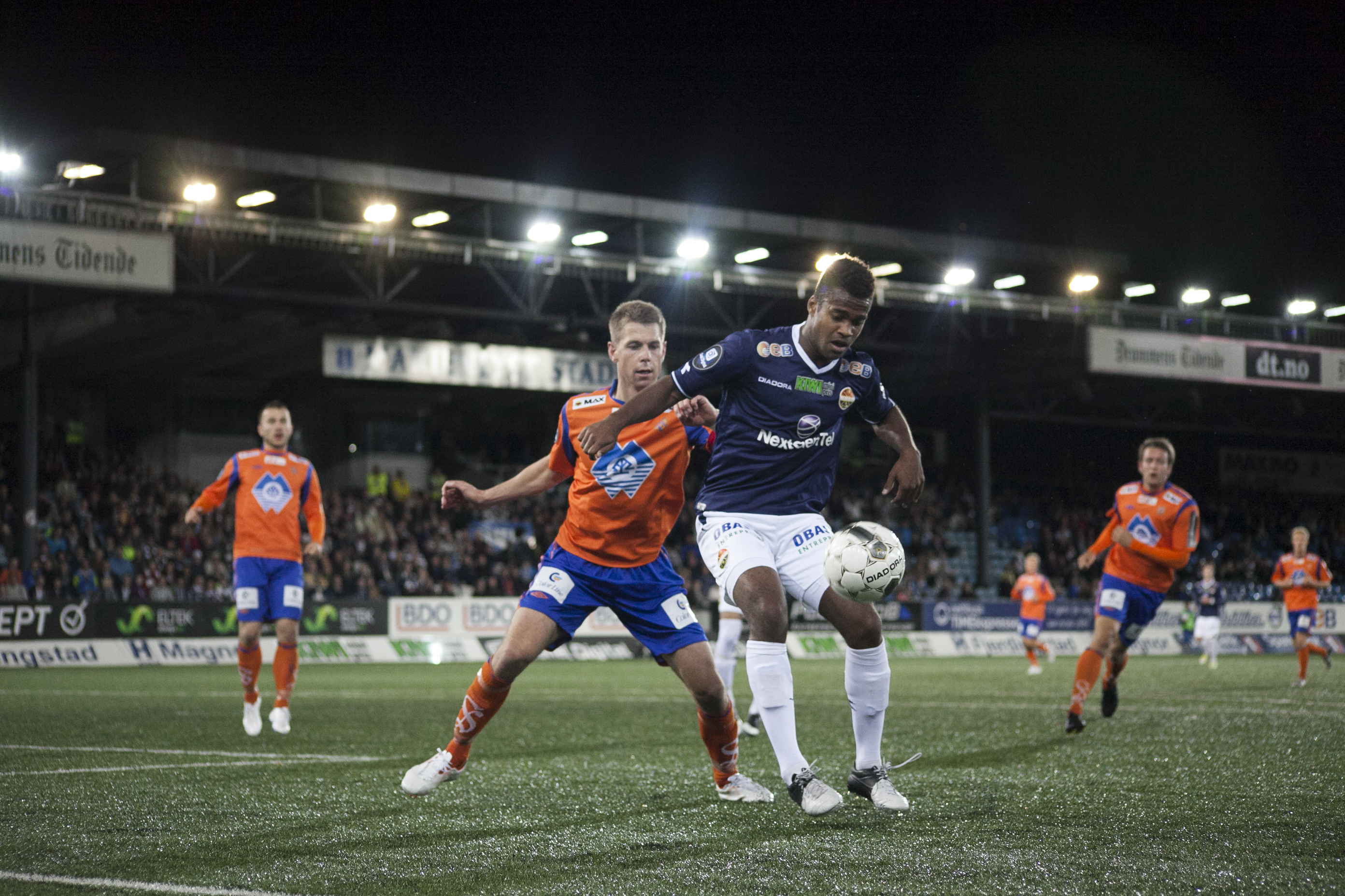 Kamara